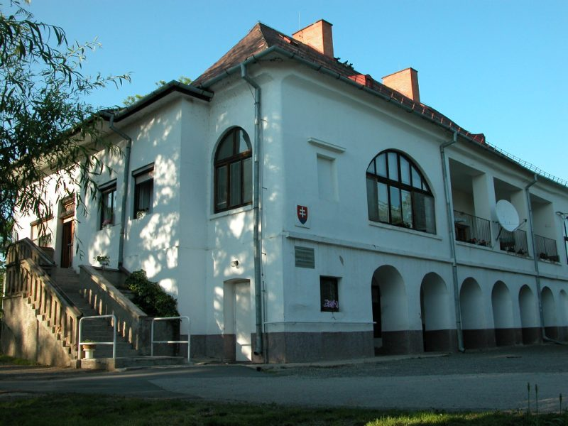 Kaštiel rodu Orosz v obci Streda nad Bodrogom Licensing